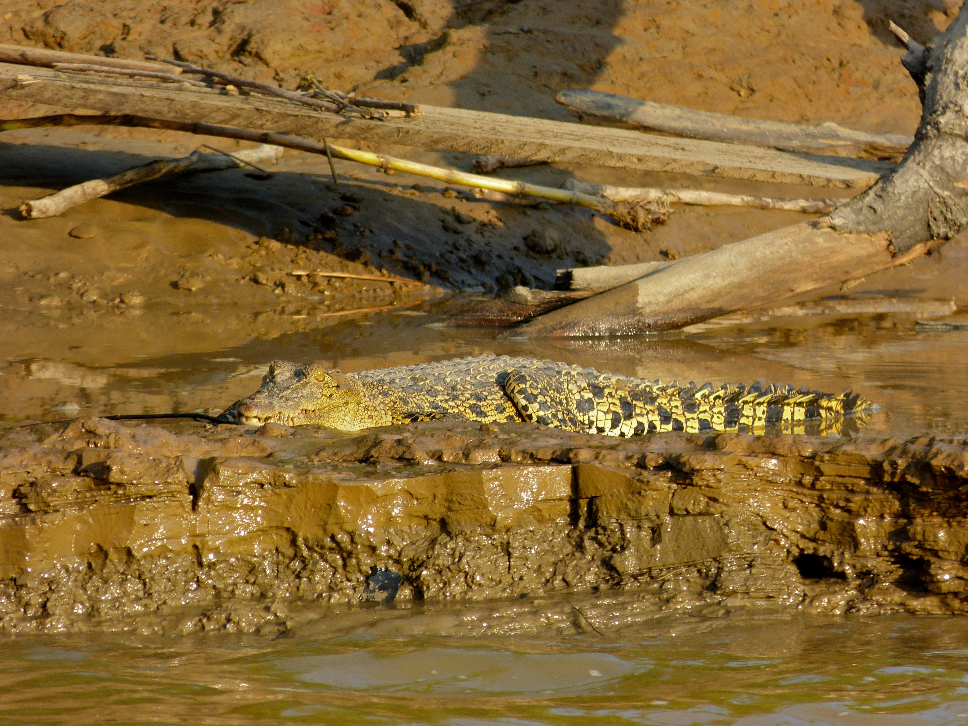 Kinabatangan River, Sukau, Sabah, MALAYSIA